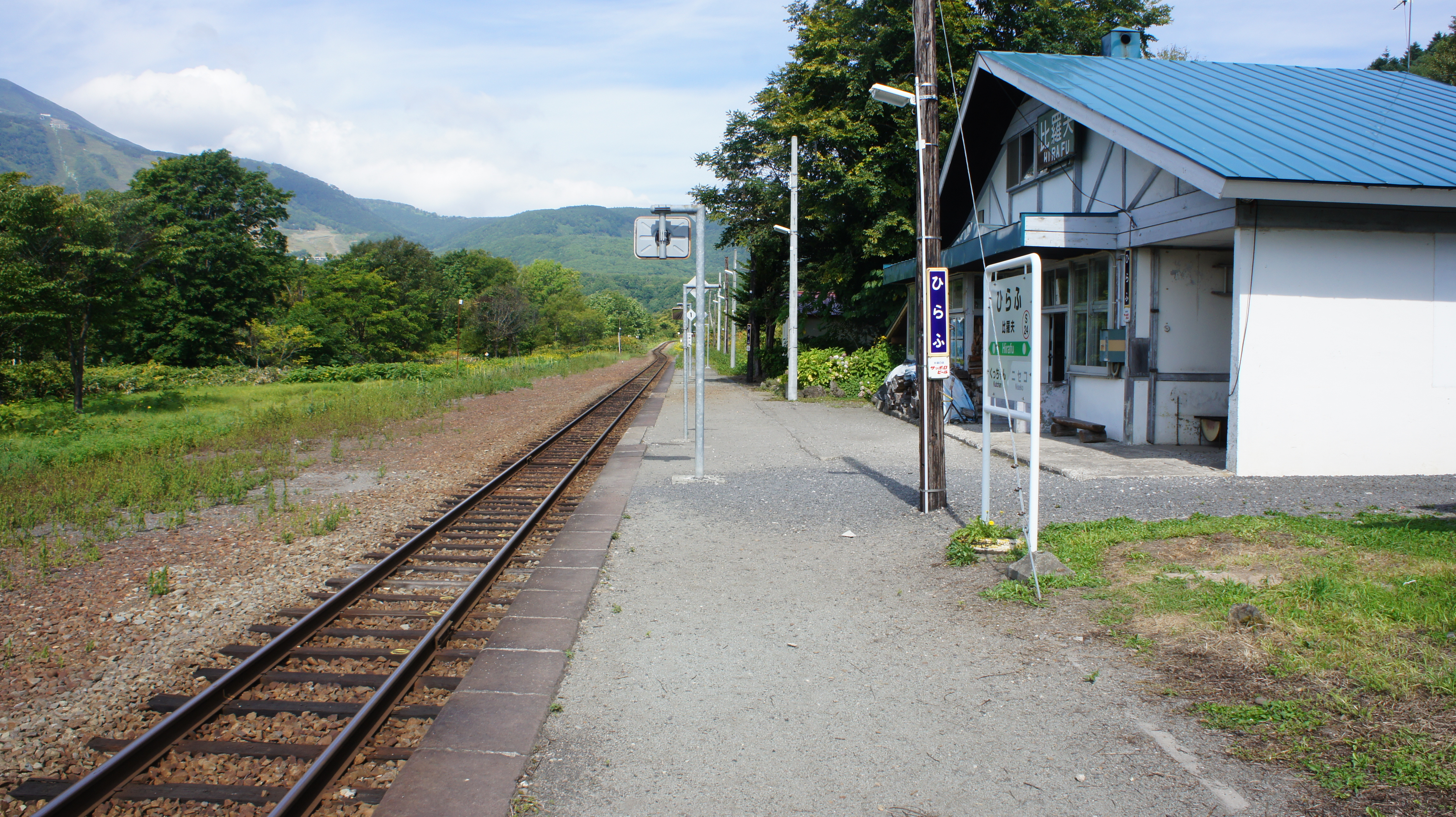 JR函館本線・比羅夫駅のホーム Sony NEX-3